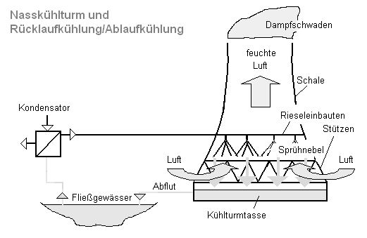 Rücklaufkühlung